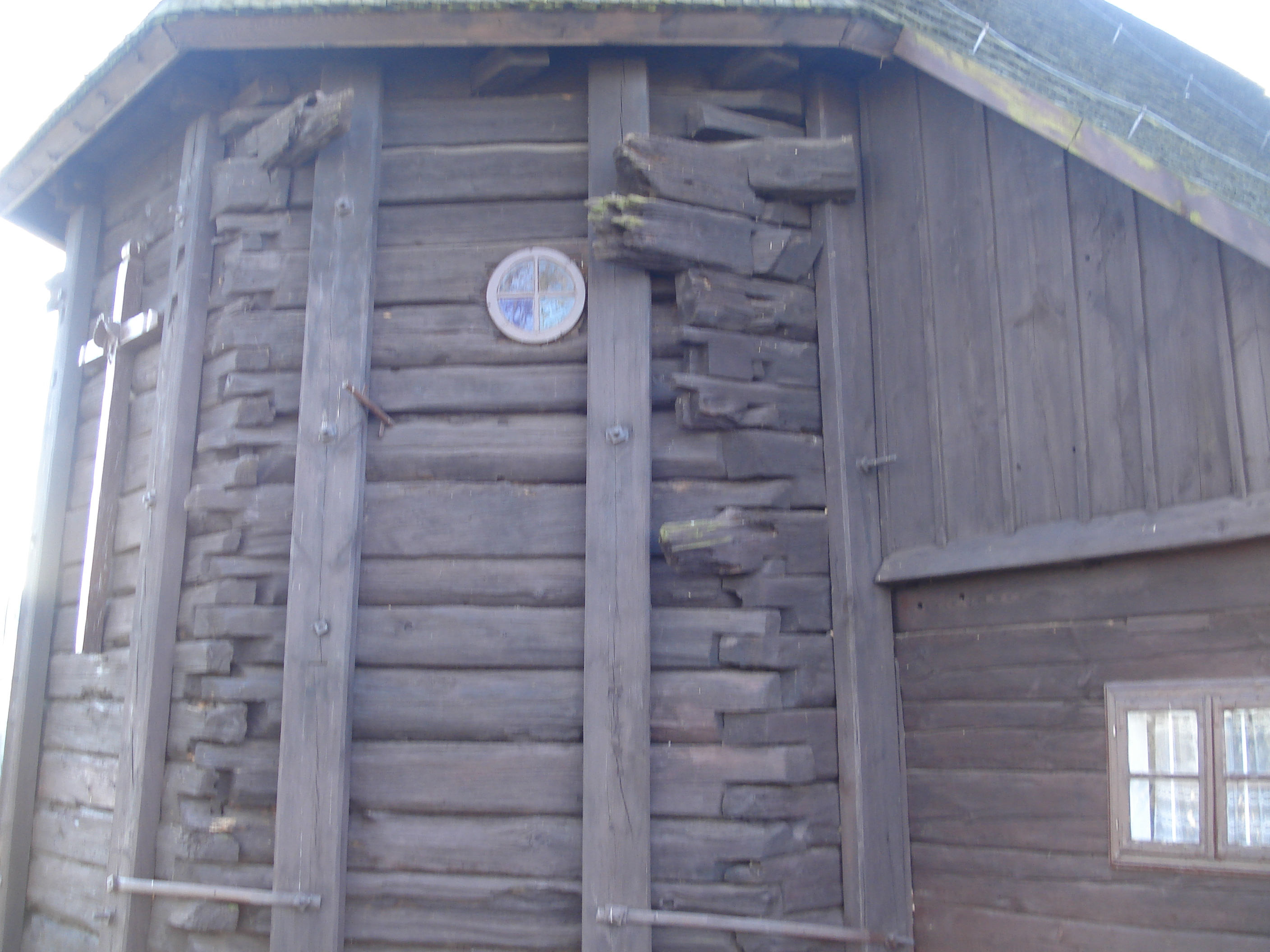 Kościół parafialny w Budzynku (pow. Poddębice). Na zdjęciu XVI-wieczna część prezbiterialna kościoła. Widoczne ostatki i lisice